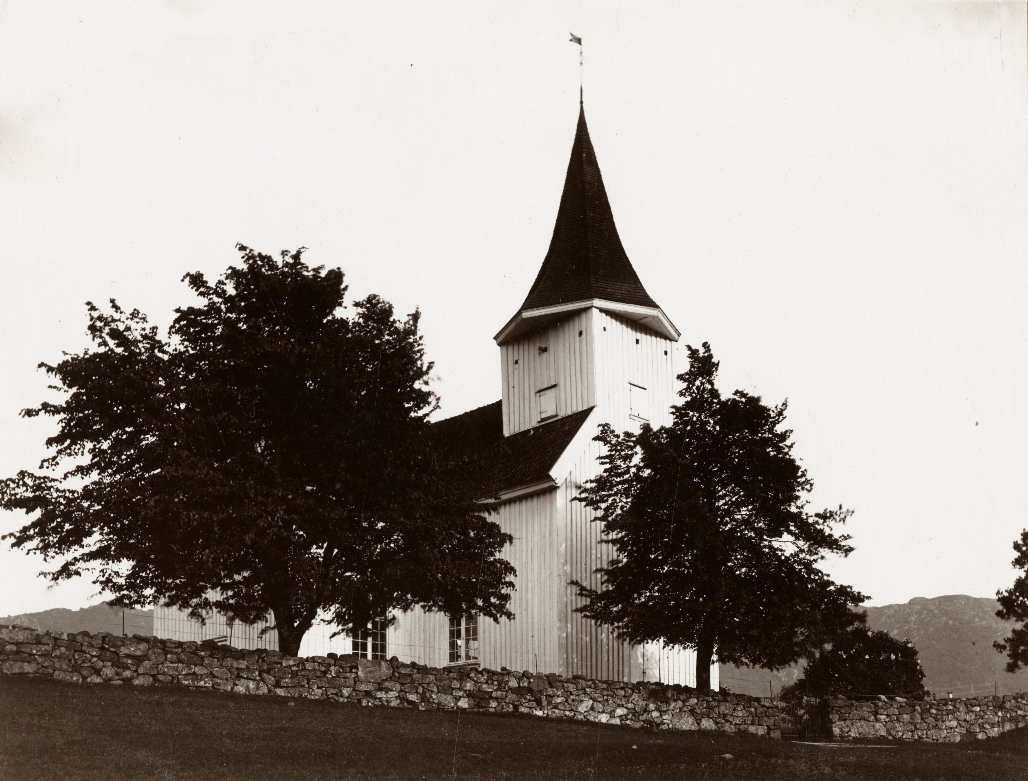 Feda kirke i Feda, Vest-Agder This image on crowdsourcing geotagging platform Fotodugnad